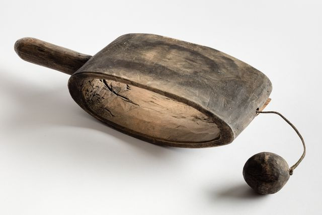 Lakutin